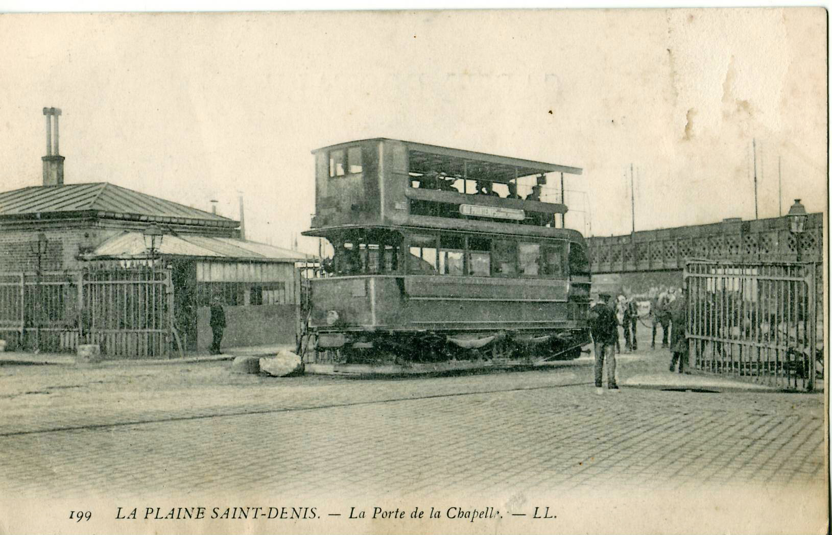 Carte postale ancienne éditée par LL, n°199 :LA PLAINE SAINT-DENIS - La Porte de la Chapelle